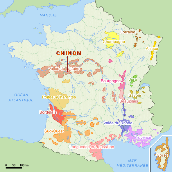 AOC Chinon en France